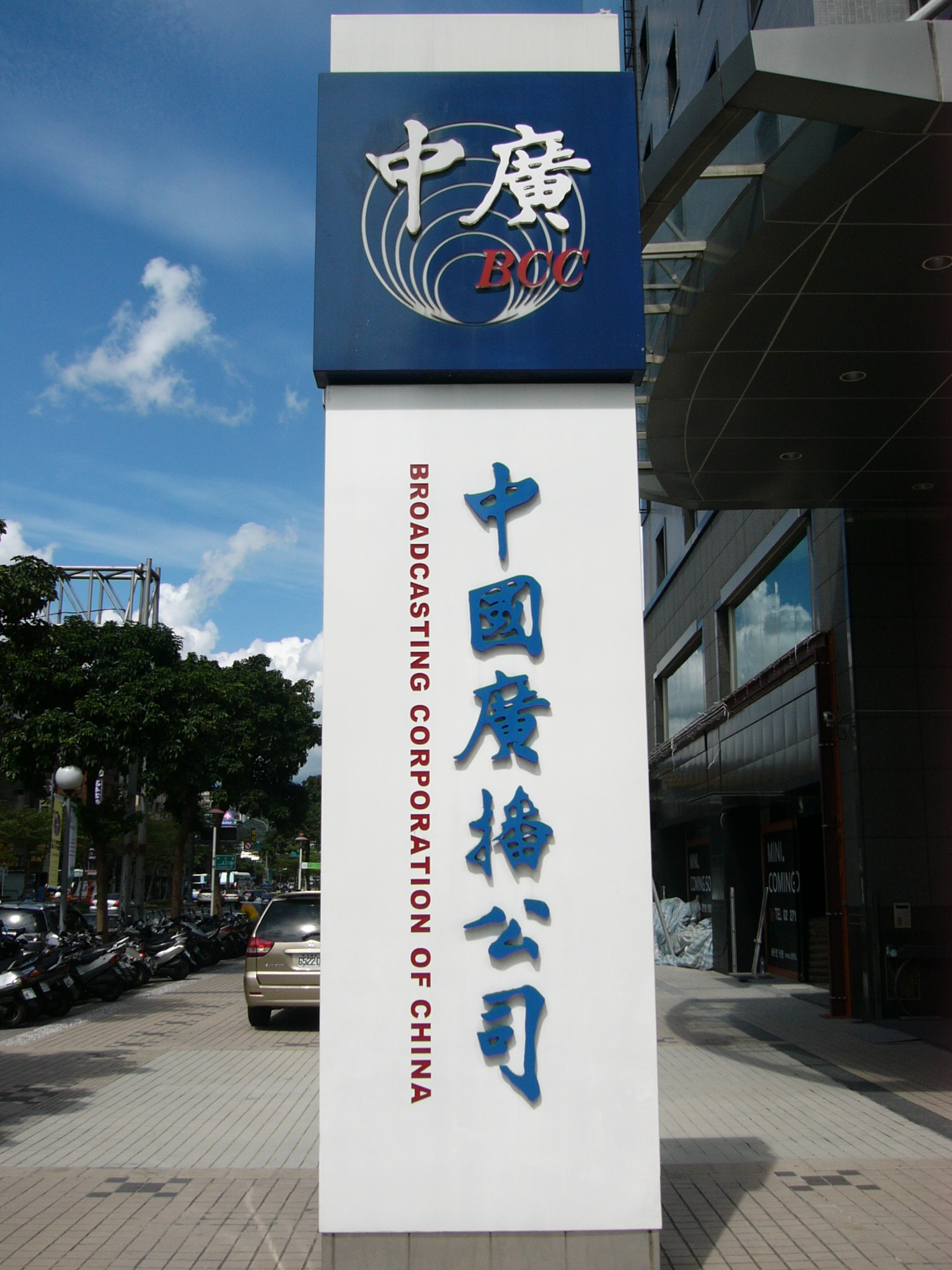 中廣松江大樓前方人行道上的中國廣播公司商標立牌。